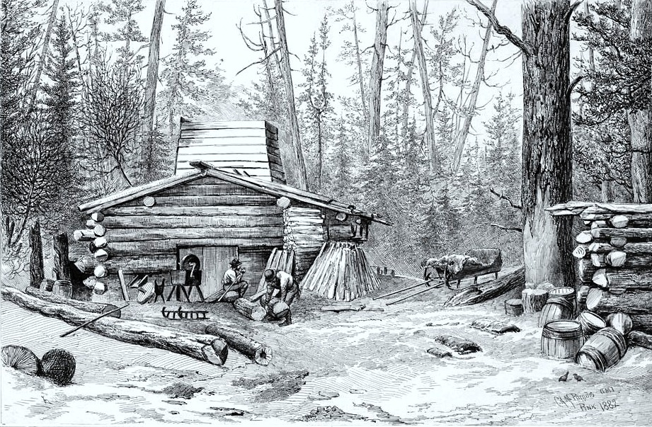 Chantier au Lac Temiskaming, 1882